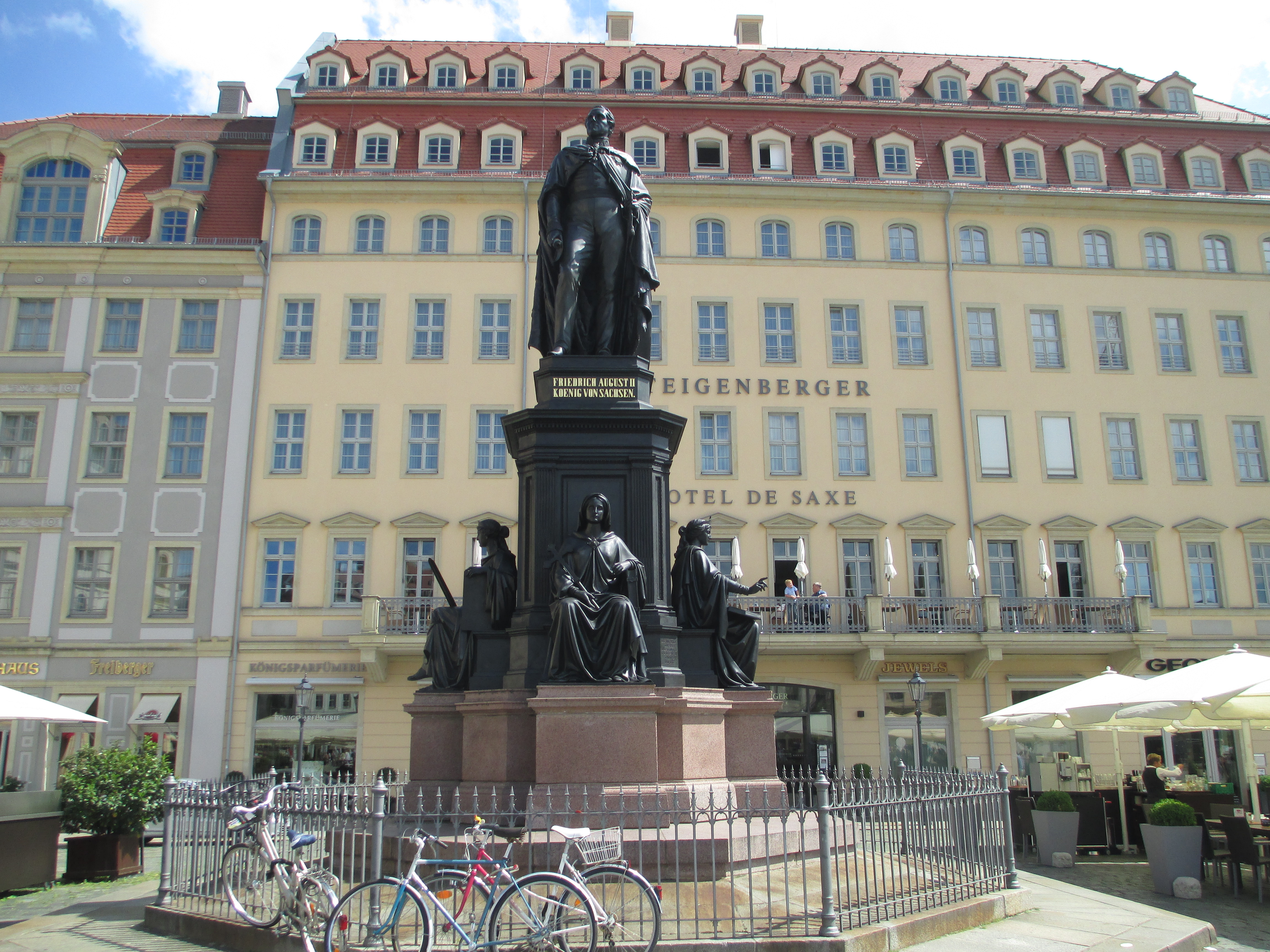 פסל של פרידריך אוגוסטוס השני בדרזדן